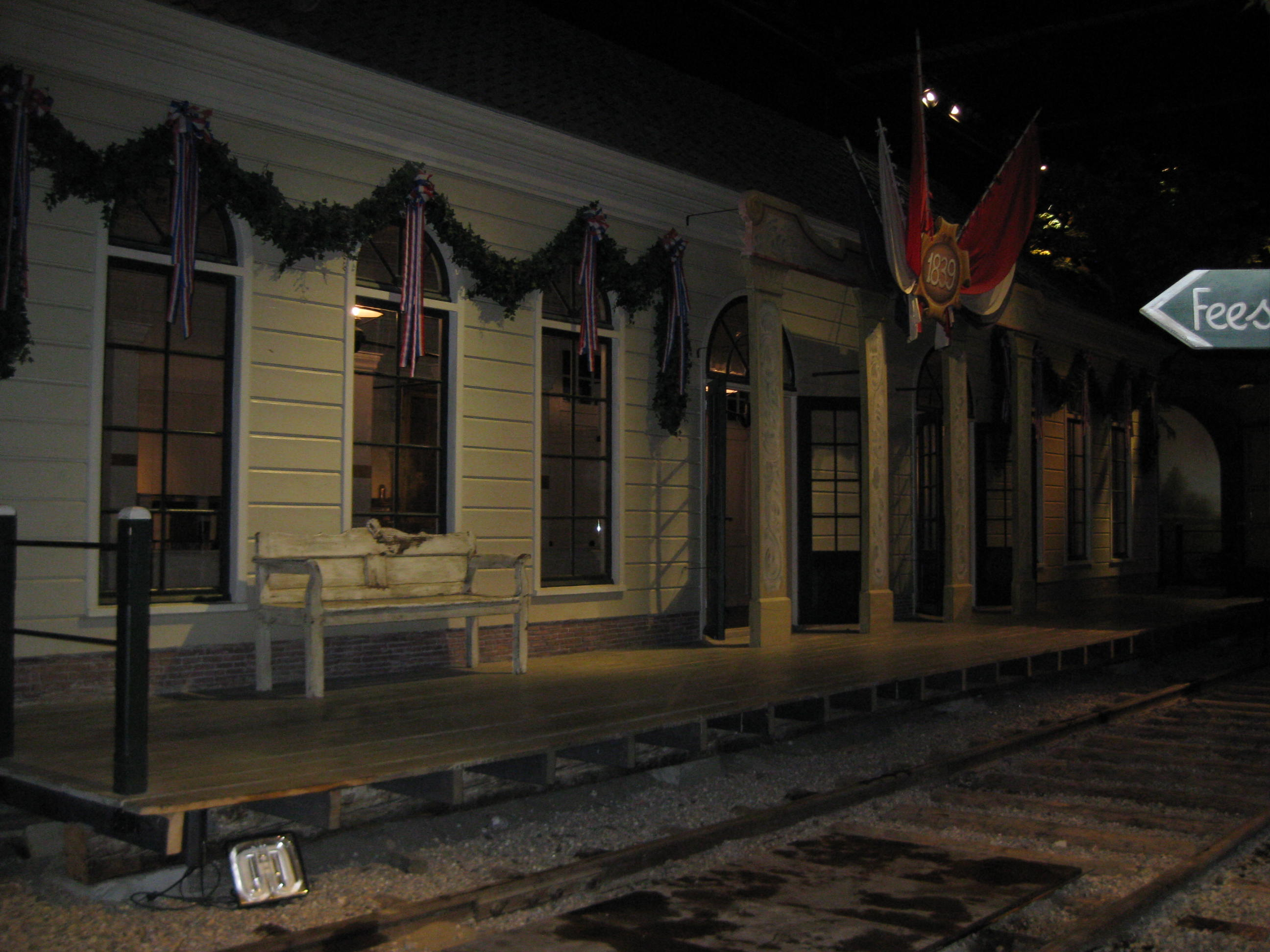 Replica van Station d'Eenhonderd Roe bij Amsterdam uit 1839, in het Spoorwegmuseum te Utrecht